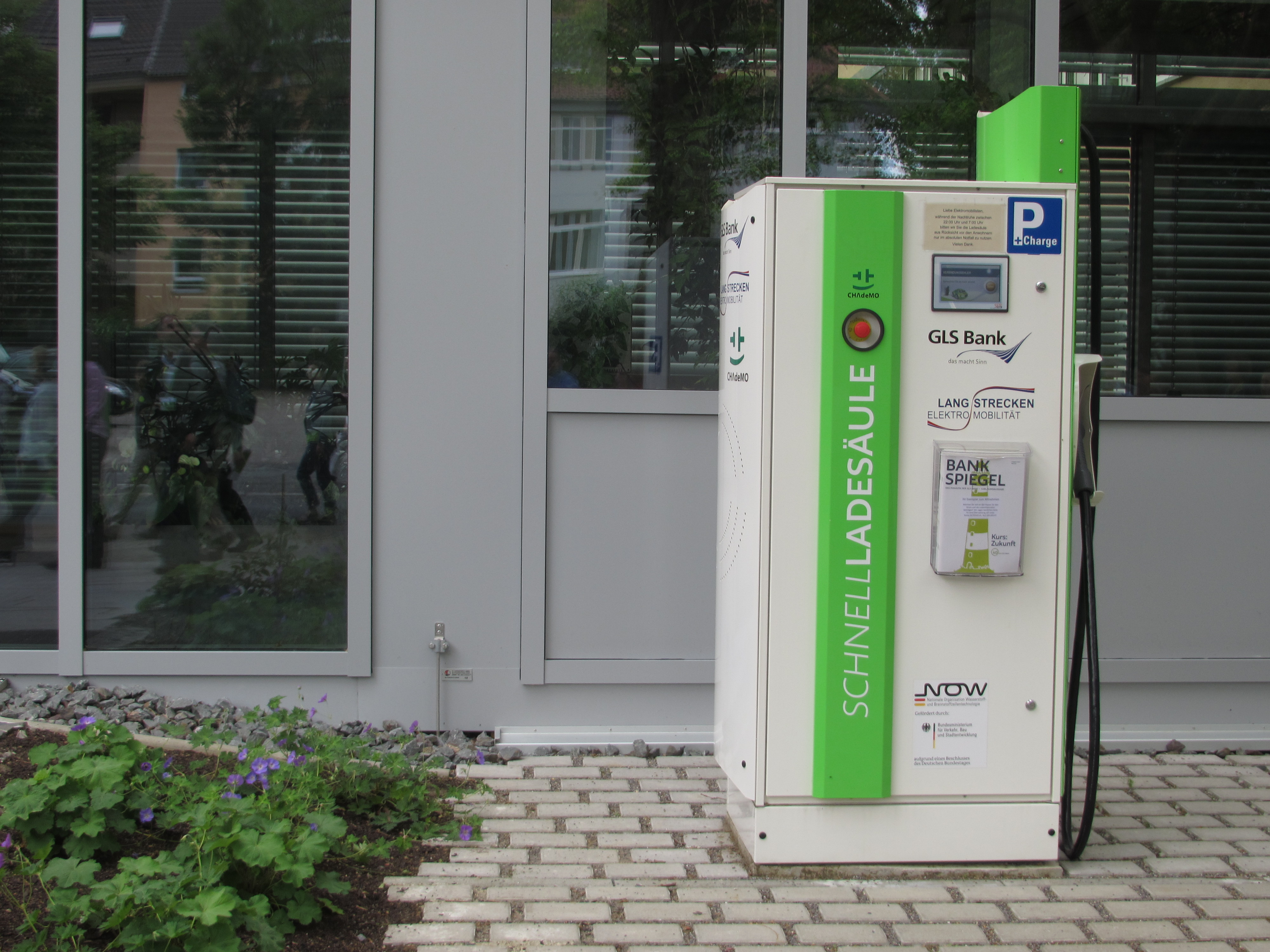 GLS Bank, Christstraße 9, 44789 Bochum, CHAdeMO-Schnellladesäule